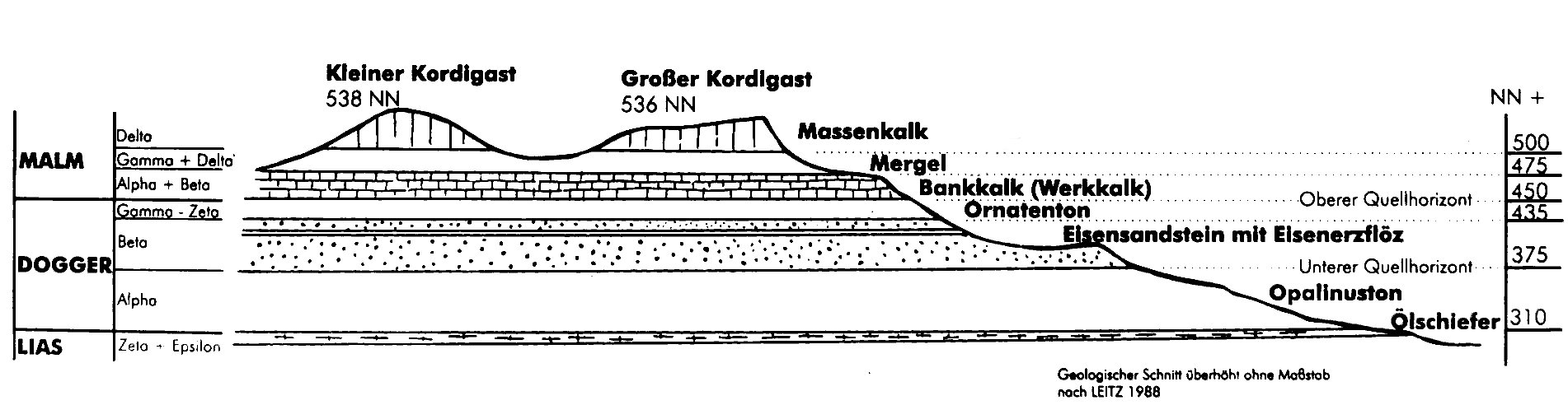 Ausschnitt über das geologische Profil des Kordigastes aus südlicher Richtung, entnommen einer Informationstafel über den Kordigast am Wanderparkplatz auf dem "Kordigast" Fotograf: Trollhead